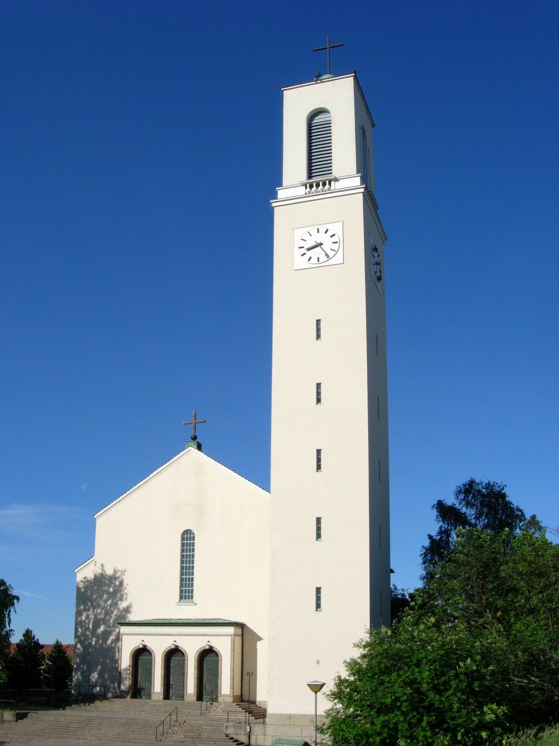 Martinkirkko